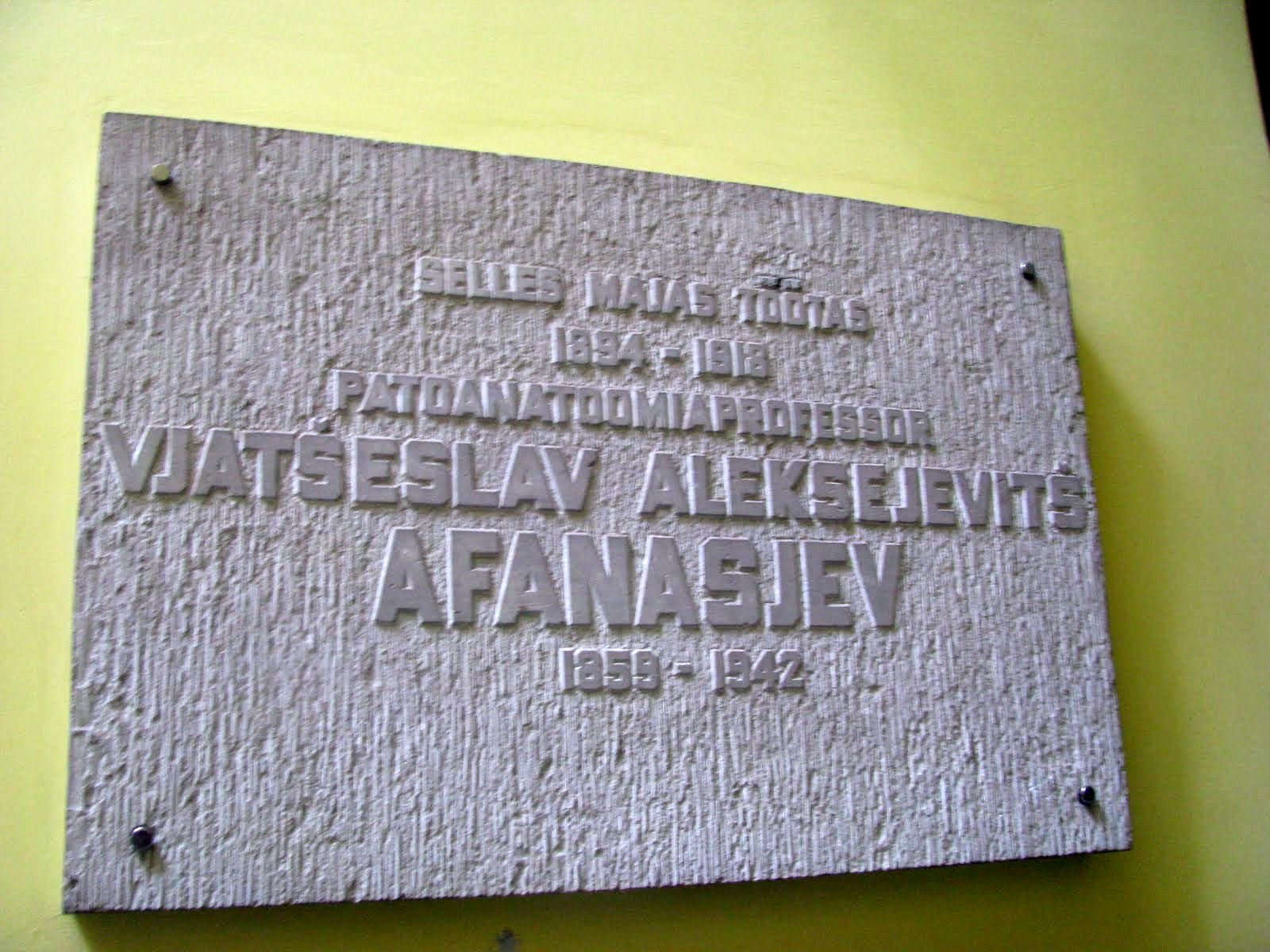 Vjatšeslav Aleksejevitš Afanasjevi mälestustahvel Tartus Uues Anatoomikumis